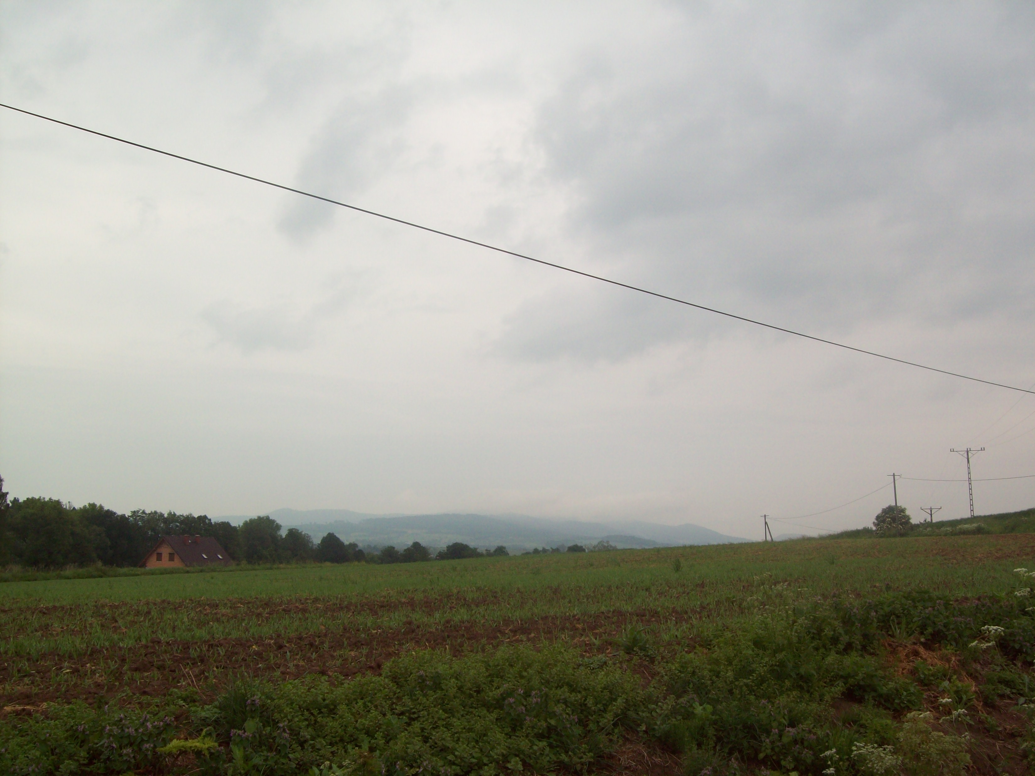 pola uprawne na Zagórzu w Kłodzku